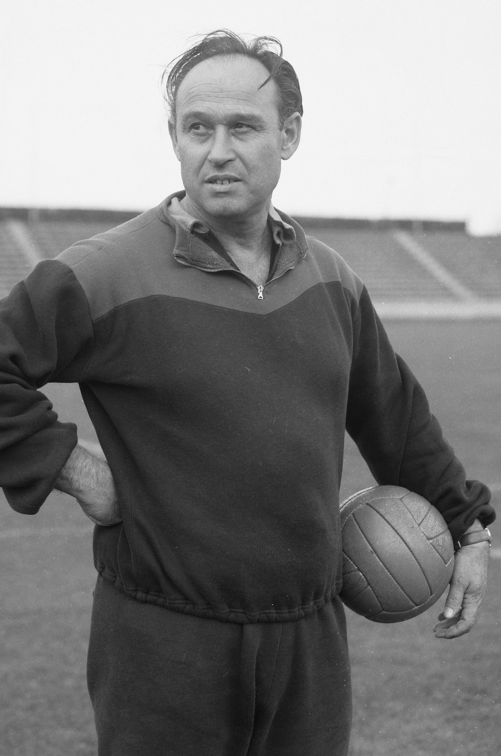 Collectie / Archief : Fotocollectie Anefo Reportage / Serie : [ onbekend ] Beschrijving : Training Nederlands elftal in Den Bosch (trainer Elek Schwartz) Datum : 14 augustus 1957 Locatie : Den Bosch Trefwoorden : trainers Persoonsnaam : Elek Schwartz Instellingsnaam : Nederlands Elftal Fotograaf : Bilsen, Joop van / Anefo Auteursrechthebbende : Nationaal Archief Materiaalsoort : Negatief (zwart/wit) Nummer archiefinventaris : bekijk toegang 2.24.01.04 Bestanddeelnummer : 908-8643